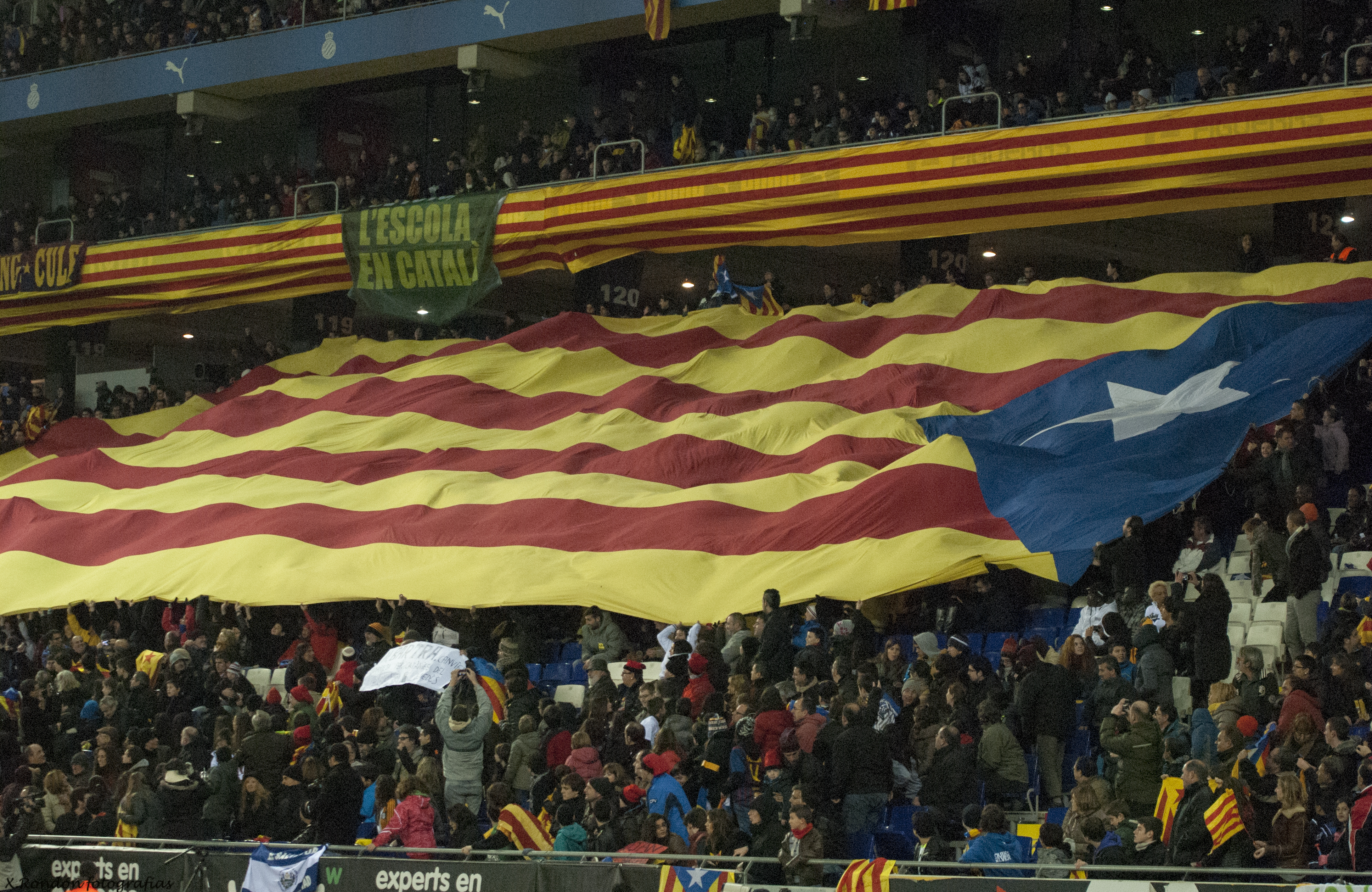 Catalunya Vs Nigeria